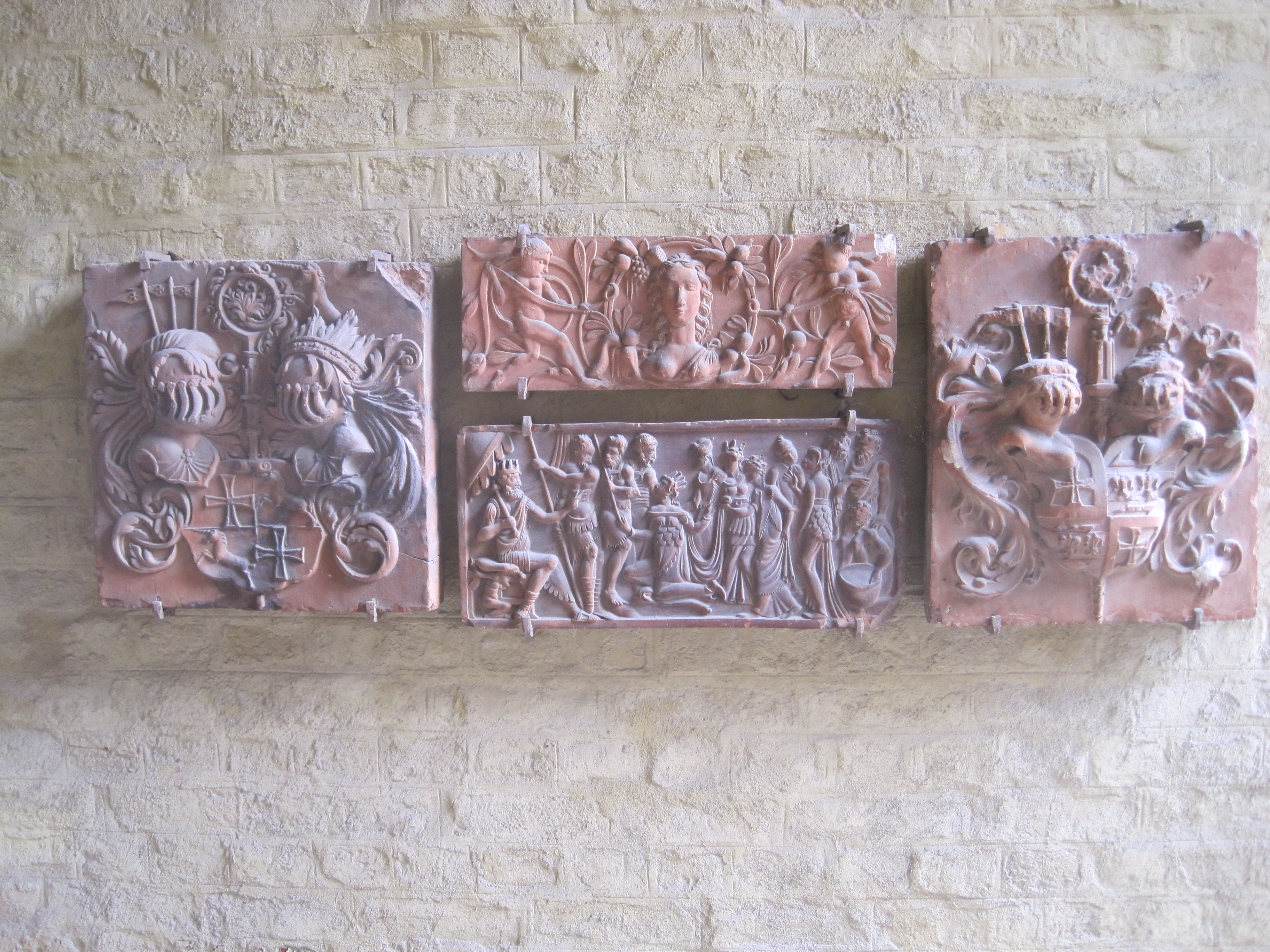 Statius von Düren: Wappen des Bischofs Andreas von Barby (links) - Friesstück weiblicher Kopf - Reliefplatte Esther vor Ahasver - Wappen des Bischofs Johannes Tiedemann